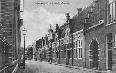 Ansicht Frans Hals Museum, Haarlem.